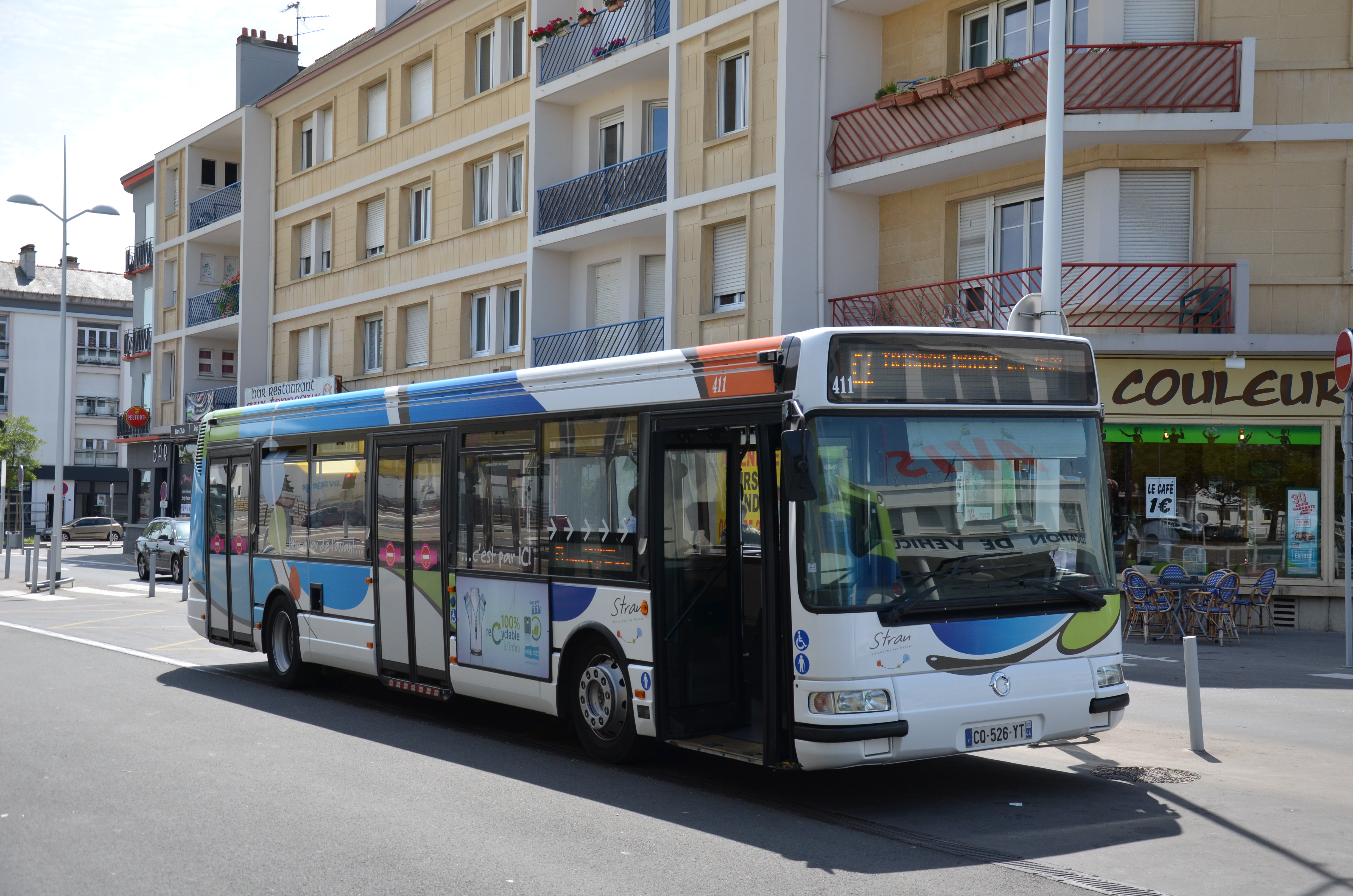 Irisbus Agora S n°411 à la gare SNCF, sur la ligne C1 du réseau STRAN de Saint-Nazaire.